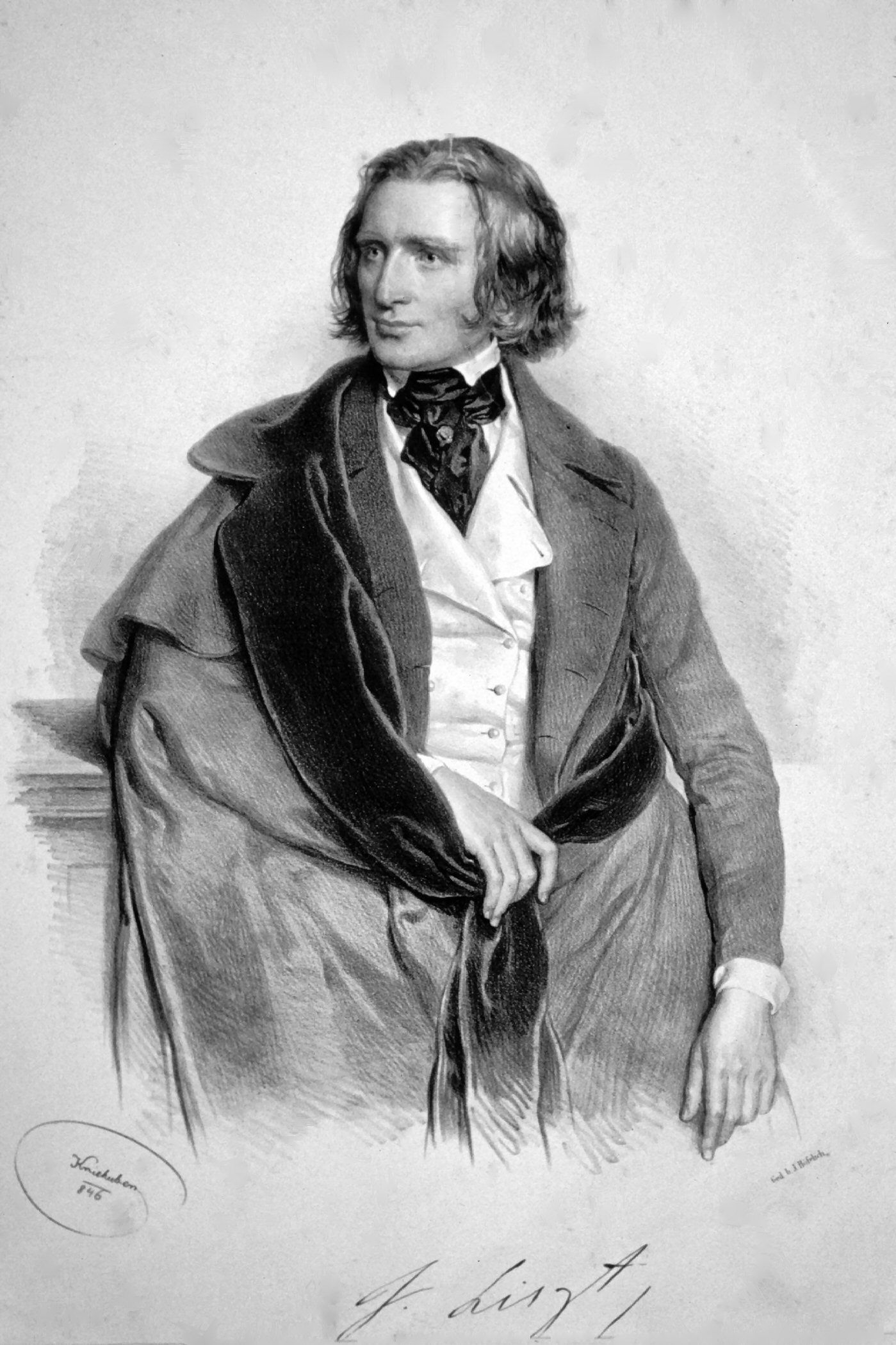 Franz Liszt (1811-1886), Composer and Pianist